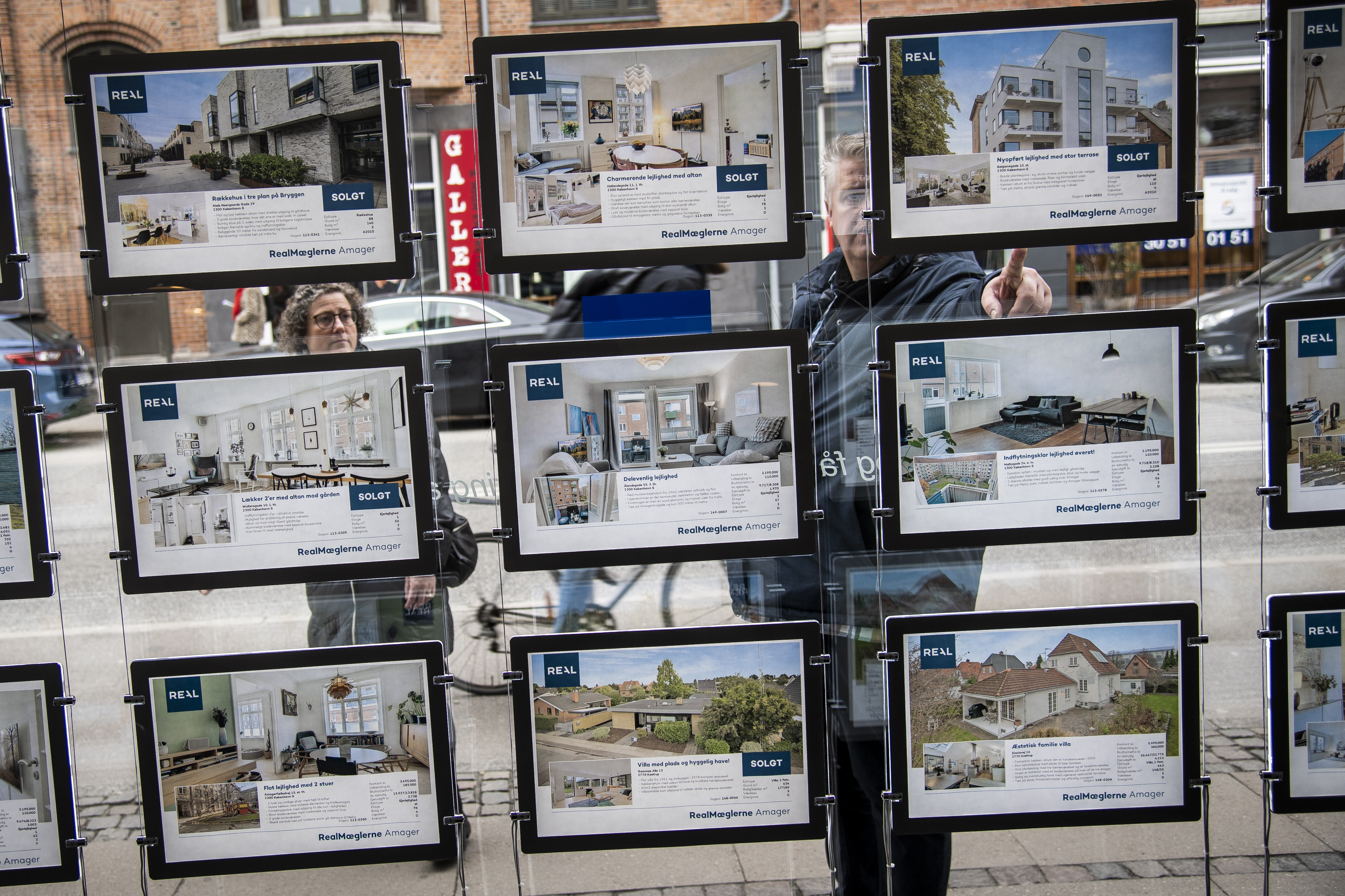 Udstillingsvindue i RealMæglerne butik